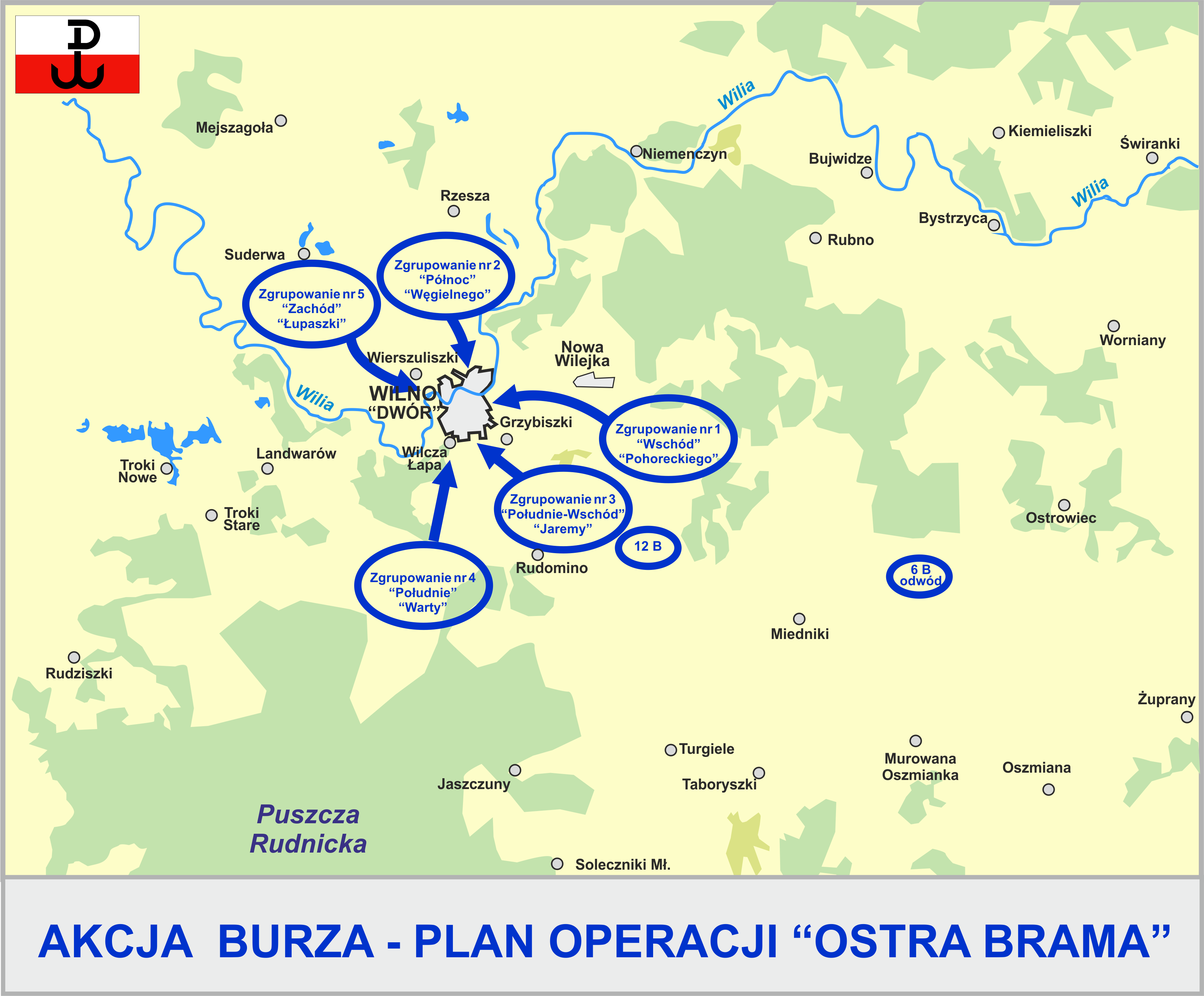 Akcja "Burza" - Plan operacji "Ostra Brama" (lipiec 1944)